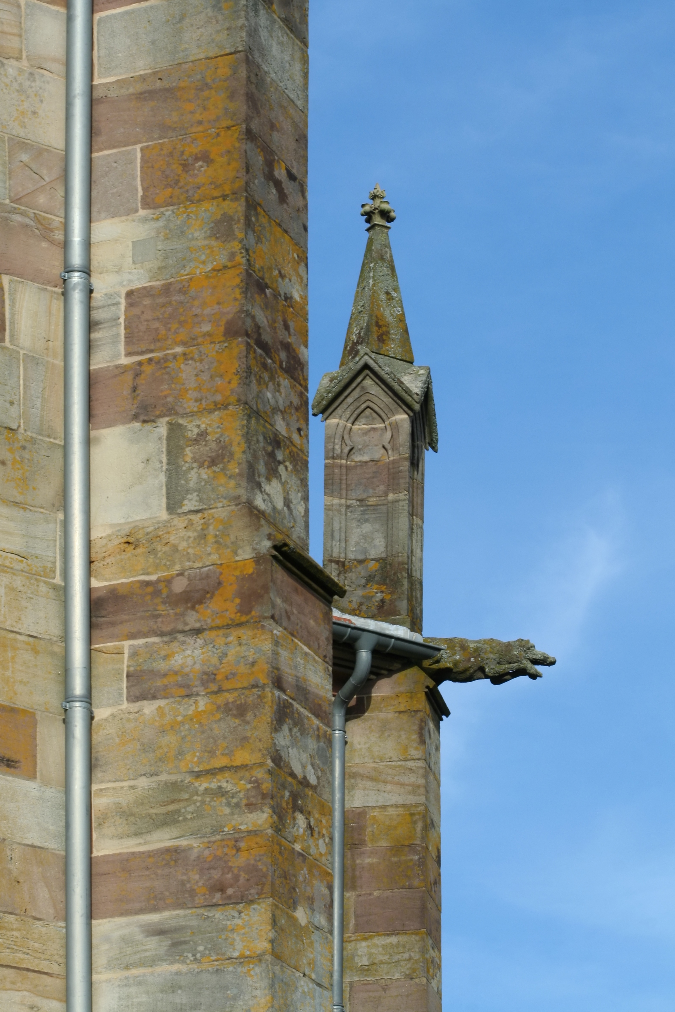 Contreforts, pinacle et gargouille de l'église Sainte-Libaire de Padoux (Vosges)